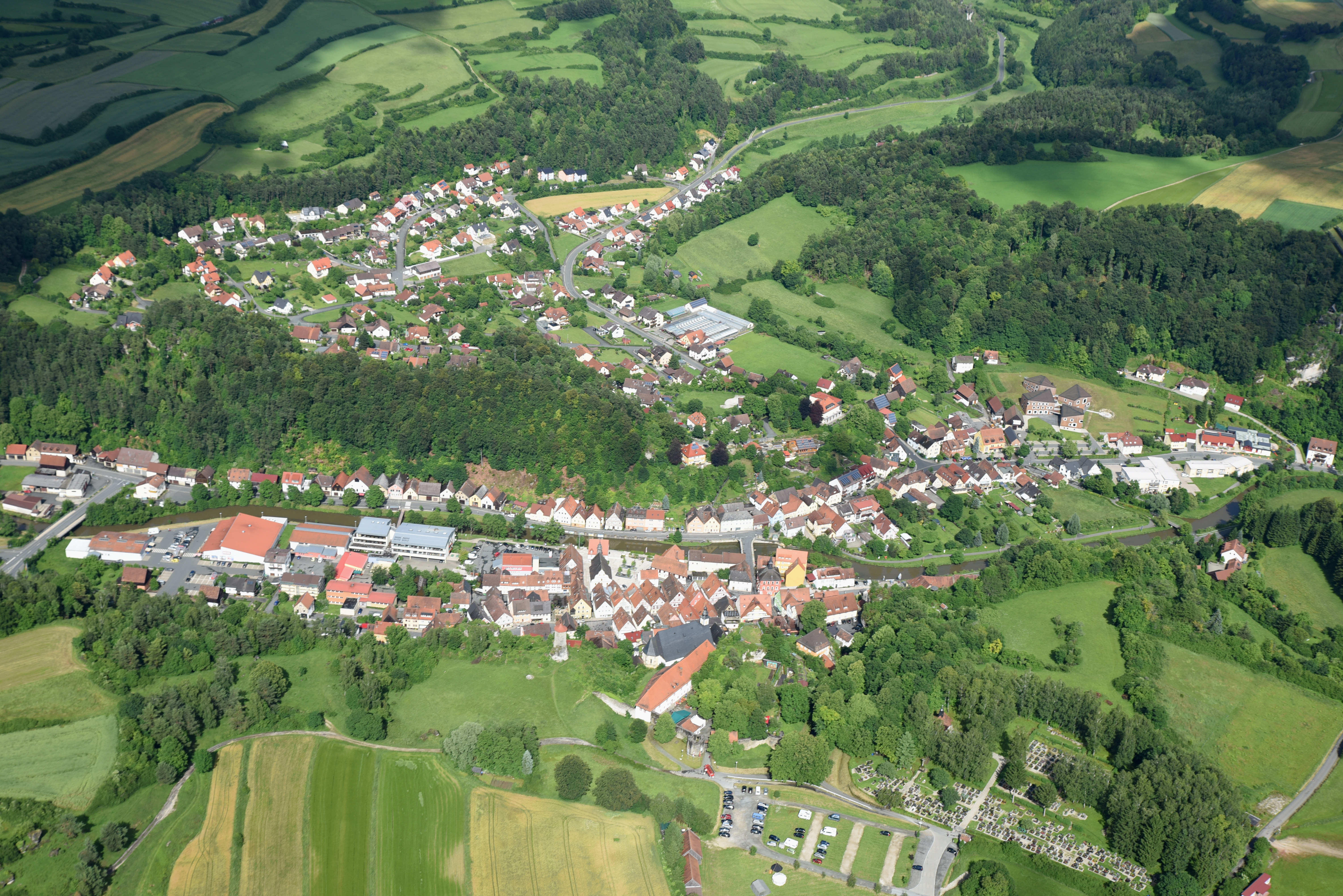 Luftaufnahme Waischenfeld